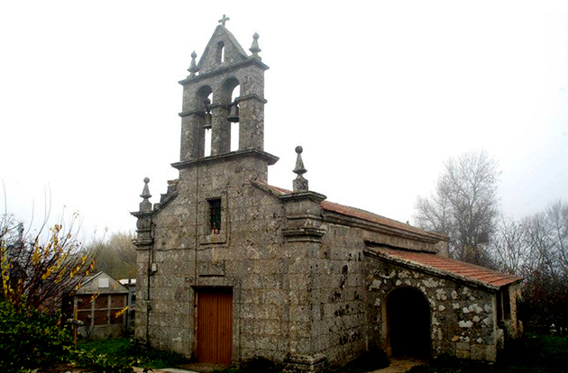 Iglesia de Sª Maria en Soutochao